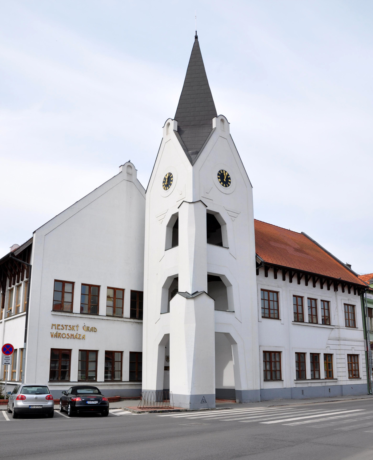 Dunaszerdahely, városháza